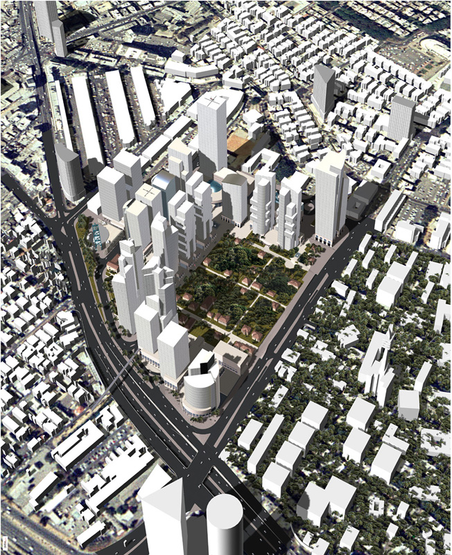 פרויקט דרום הקריה (שרונה), תל אביב